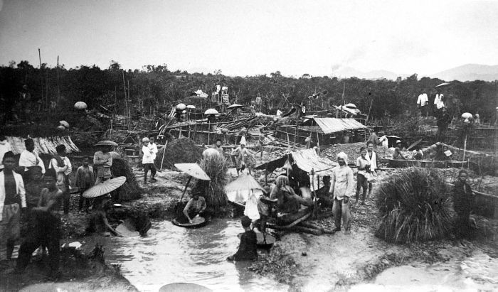 Repronegatief. Diamantwinning bij Tjempaka bij Martapoera, Zuidoost-Borneo